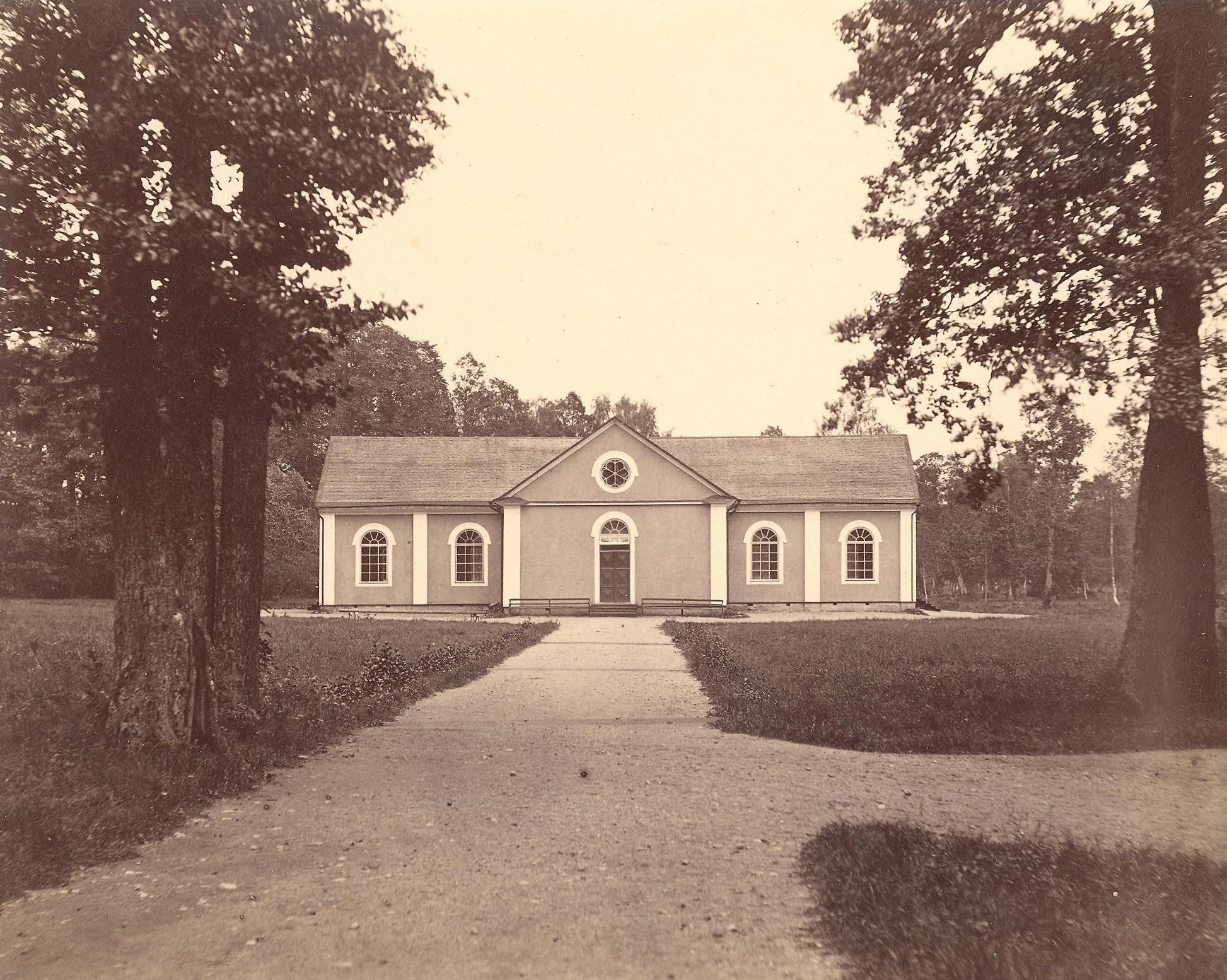 Fotografi föreställande Sätra brunns kyrka. "Prisbelönt i Wien 1873 och London 1874" "O Wiklund, Westerås". Skapandedatum satt till första årtal.